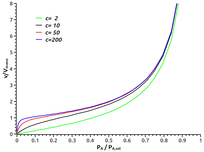 Isotherme BET pour différentes valeurs de c